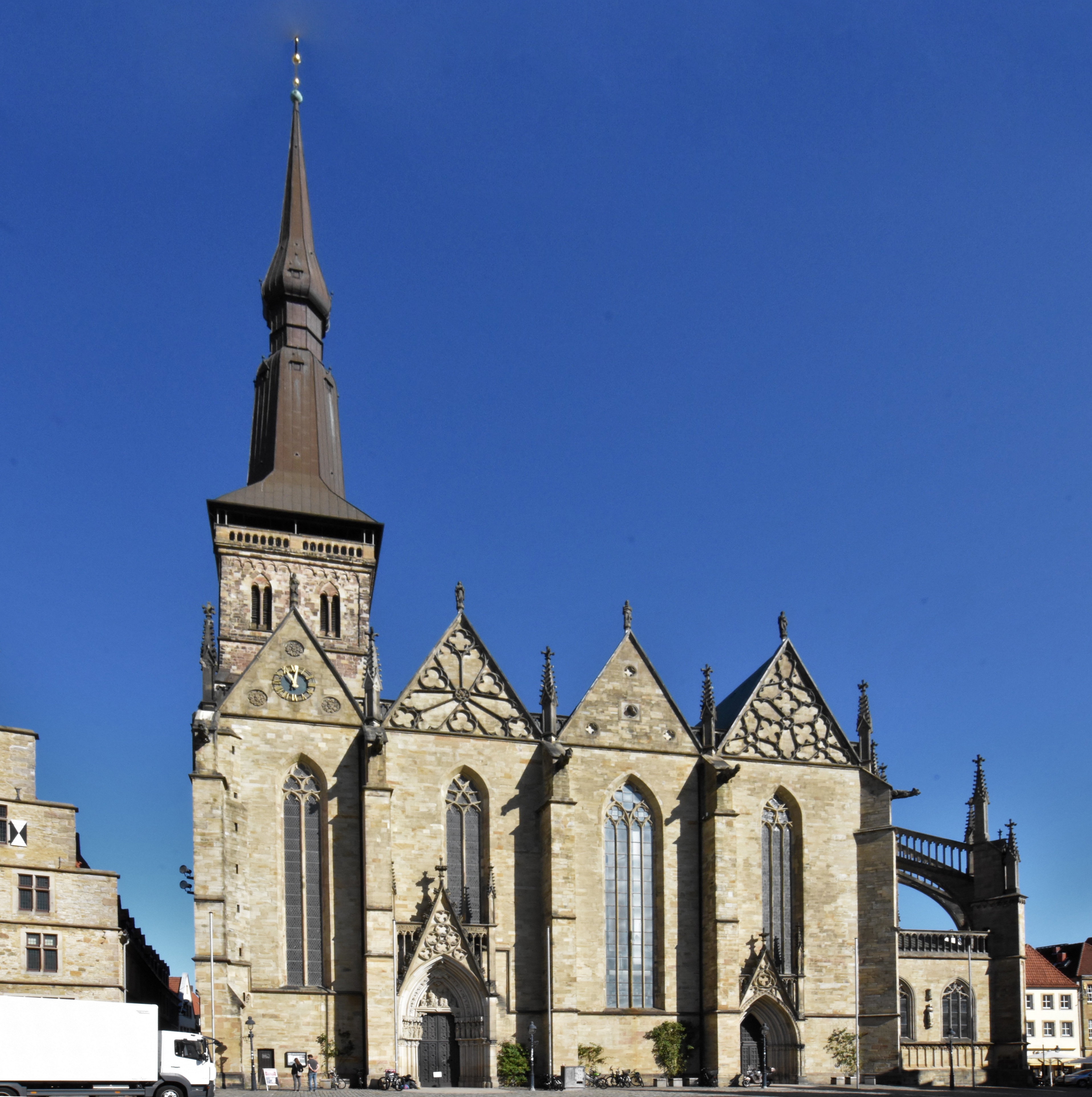 St. Marien am 22. September 2019